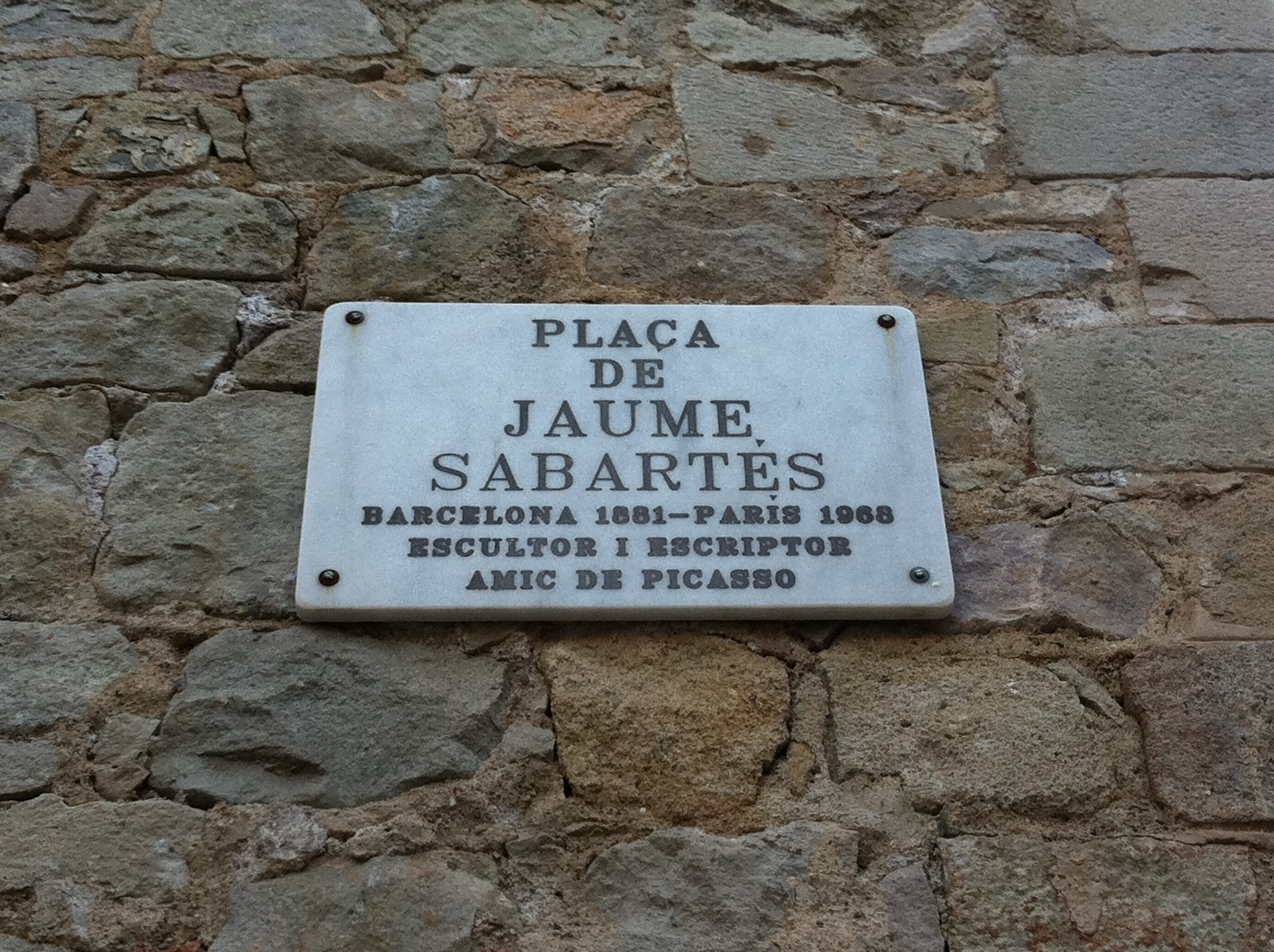 Placa de la Plaça de Jaume Sabartès